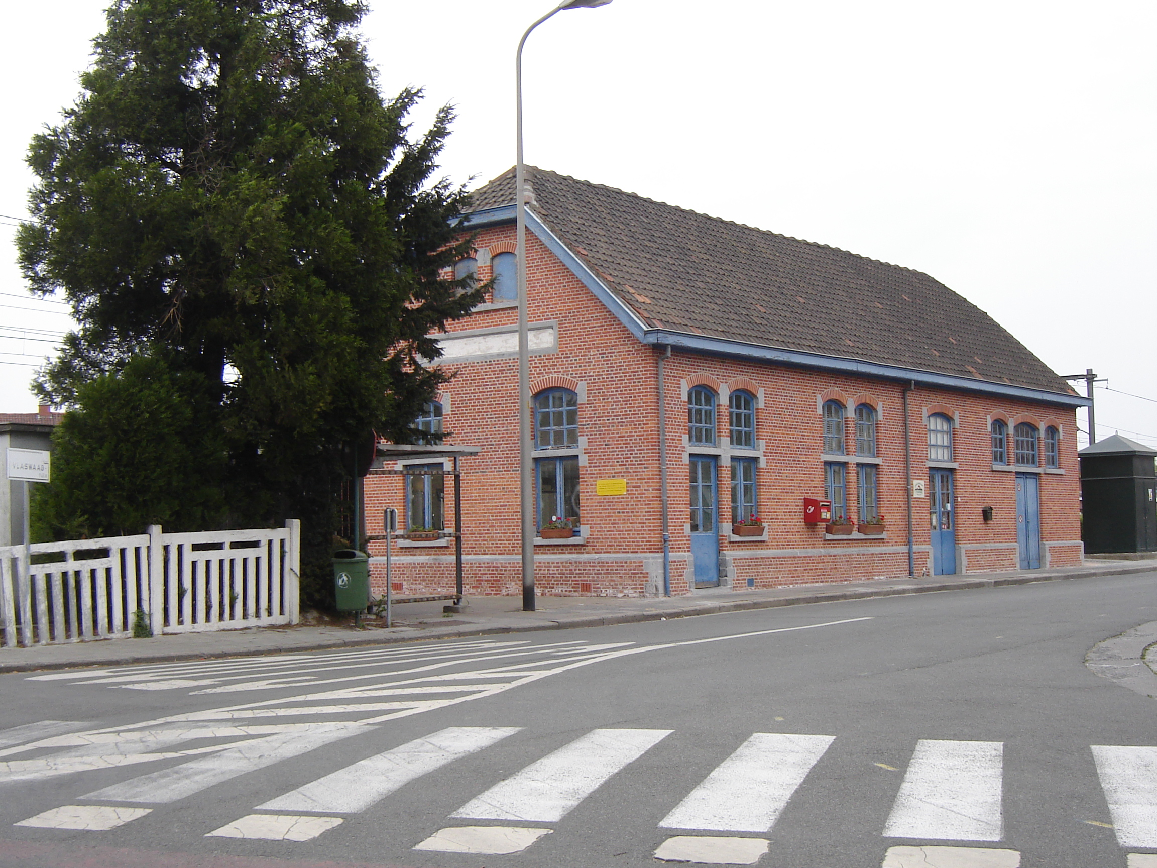 Trainstation van Bissegem (in de Bissegemsestraat)Railway station of Bissegem, Kortrijk, West Flanders, Belgium